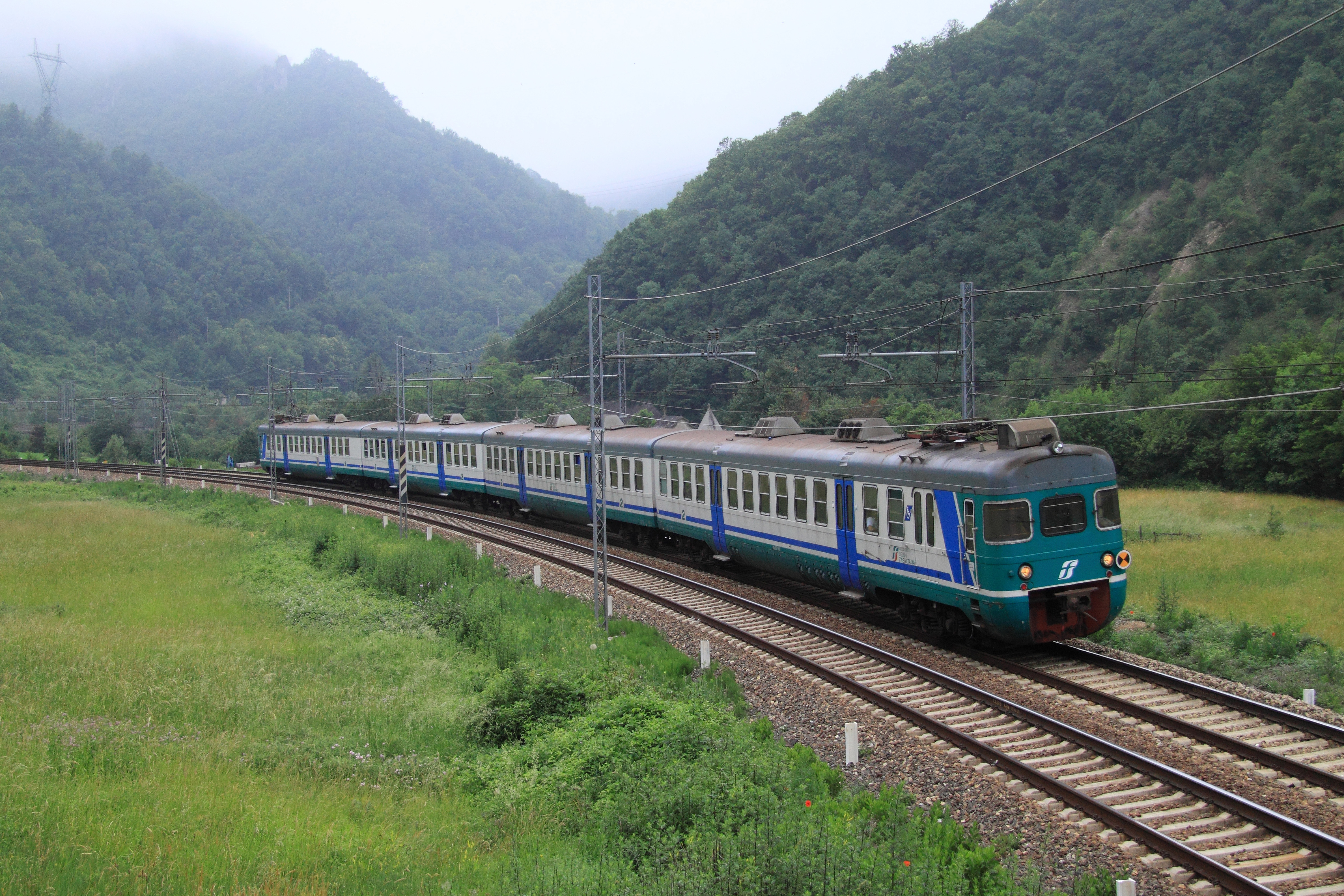 Complesso di elettromotrici ALe 801 / 940 sulla vecchia linea dei Giovi presso Isola del Cantone